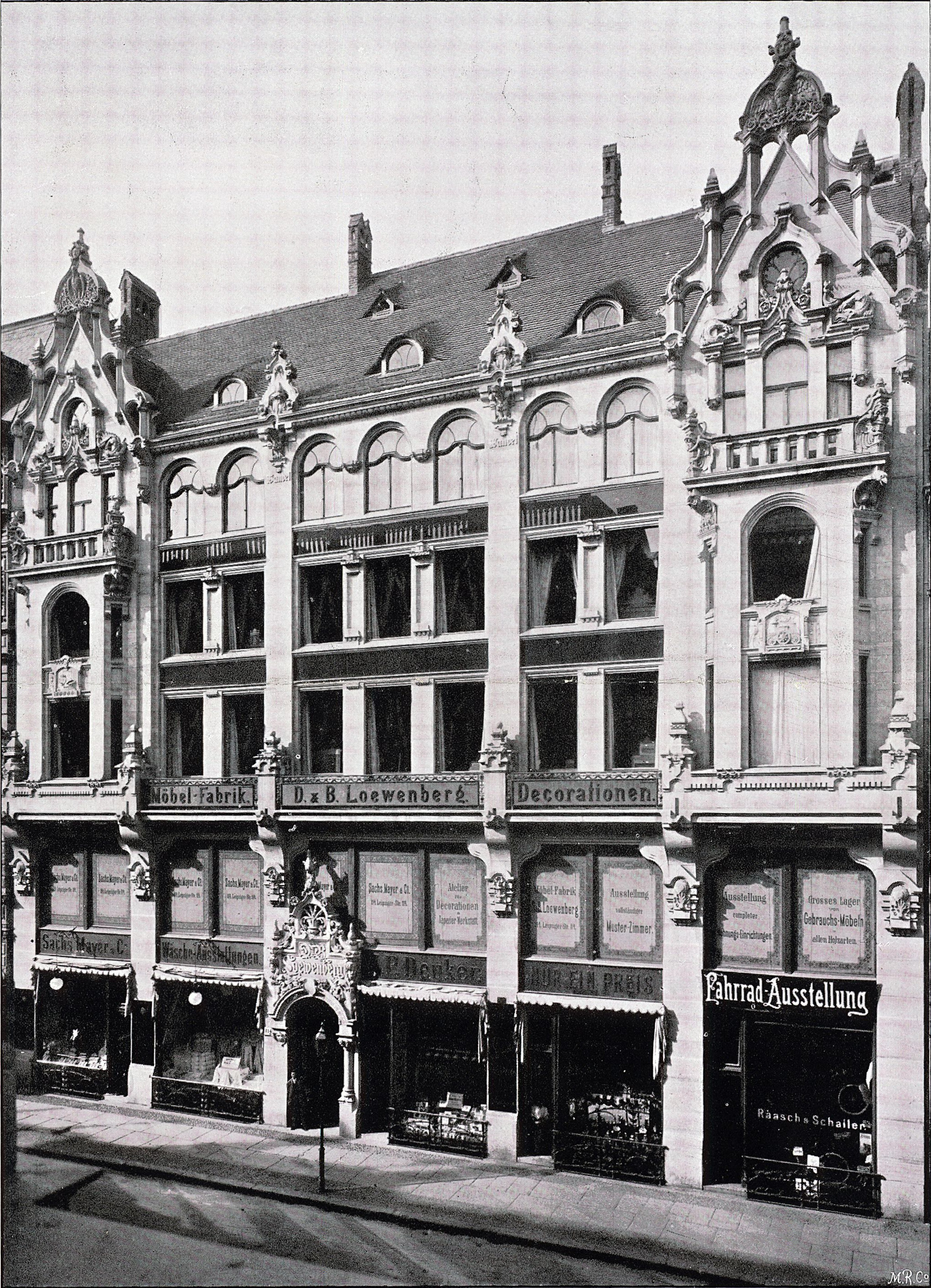 Geschäftshaus Leipzigerstrasse 114, Berlin, Architekt Hermann Krause, Berlin.JPG